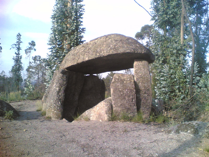 Anta de Santa Marta, também conhecido por Dolmen de Portela.